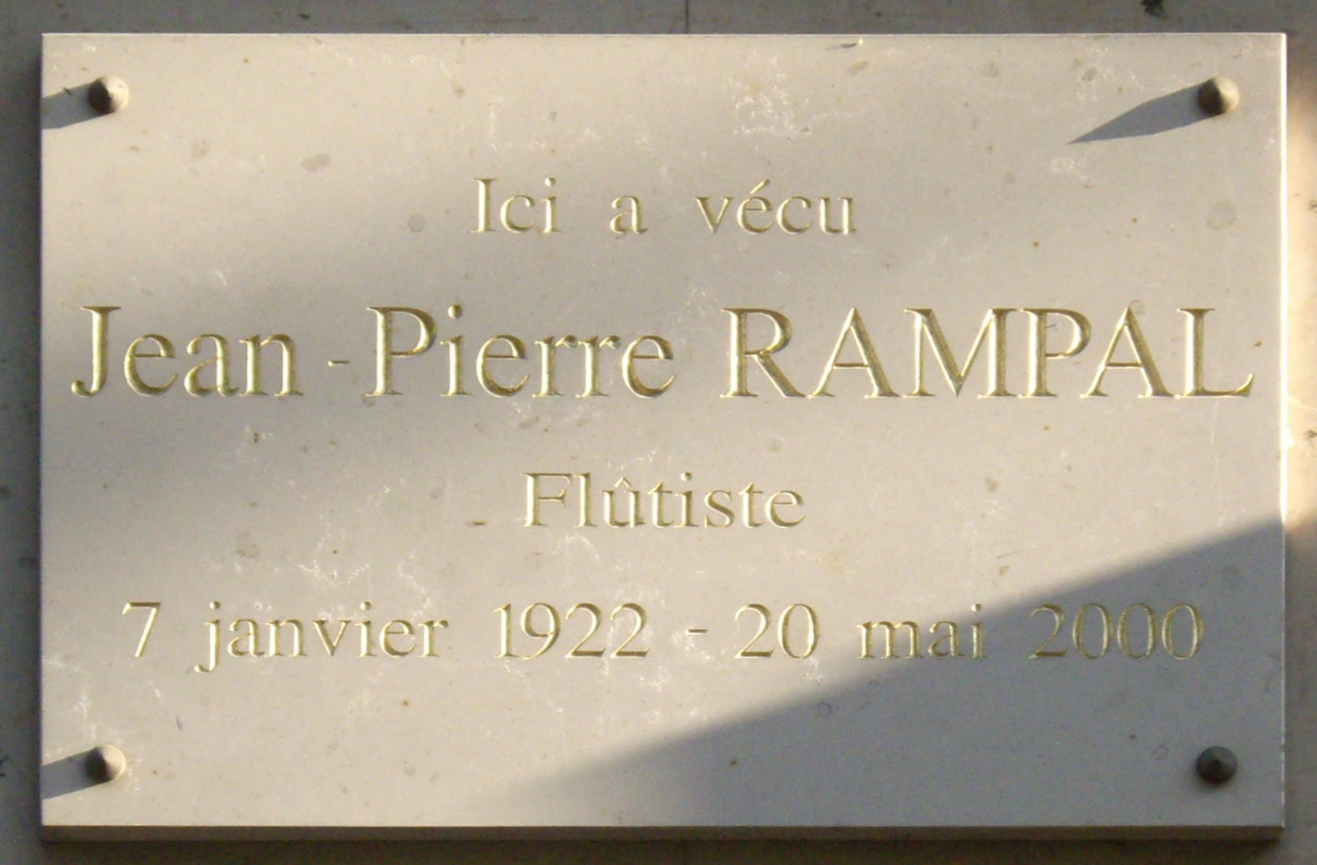 Plaque commémorative, 15 avenue Mozart, Paris 16e. « Ici a vécu Jean-Pierre Rampal, flûtiste, 7 janvier 1922 – 20 mai 2000. »